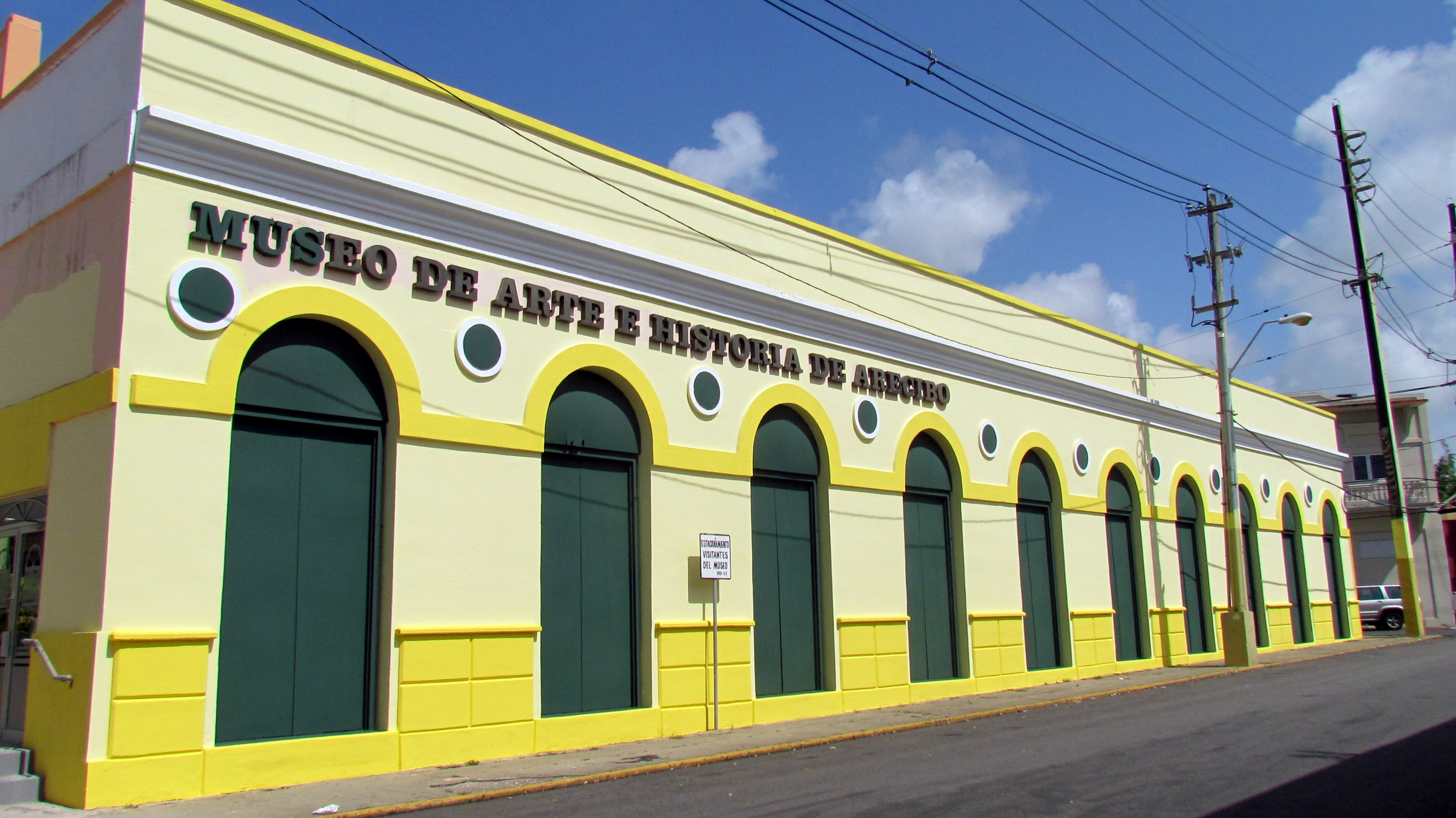 Museo de Arte e Historia de Arecibo, Puerto Rico